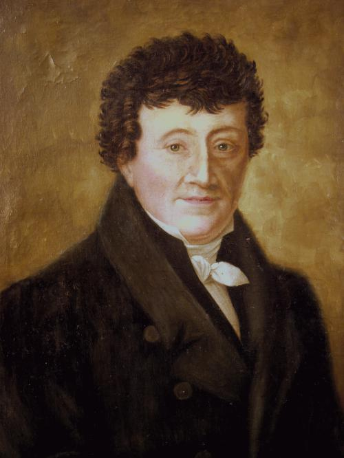 Peter Joseph Valckenberg, Weinhändler und Bürgermeister in Worms (+1834)